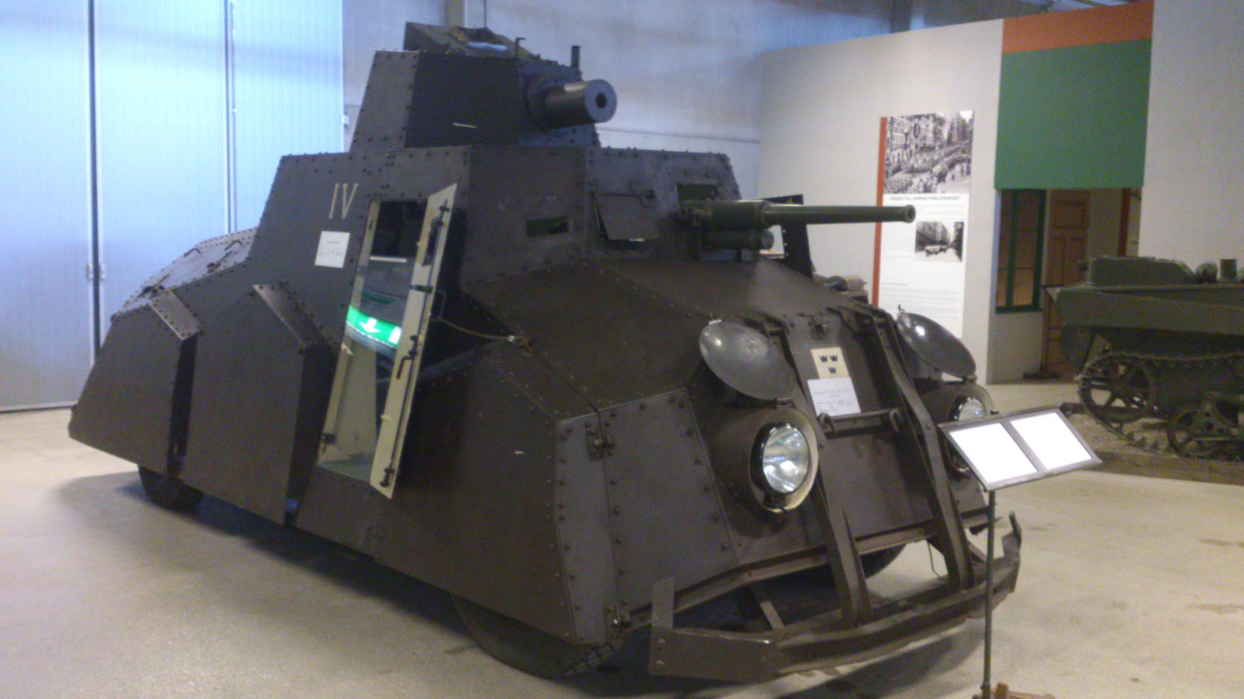 Pansarbil FM 29 på Försvarsfordonsmuseet Arsenalen i Strängnäs